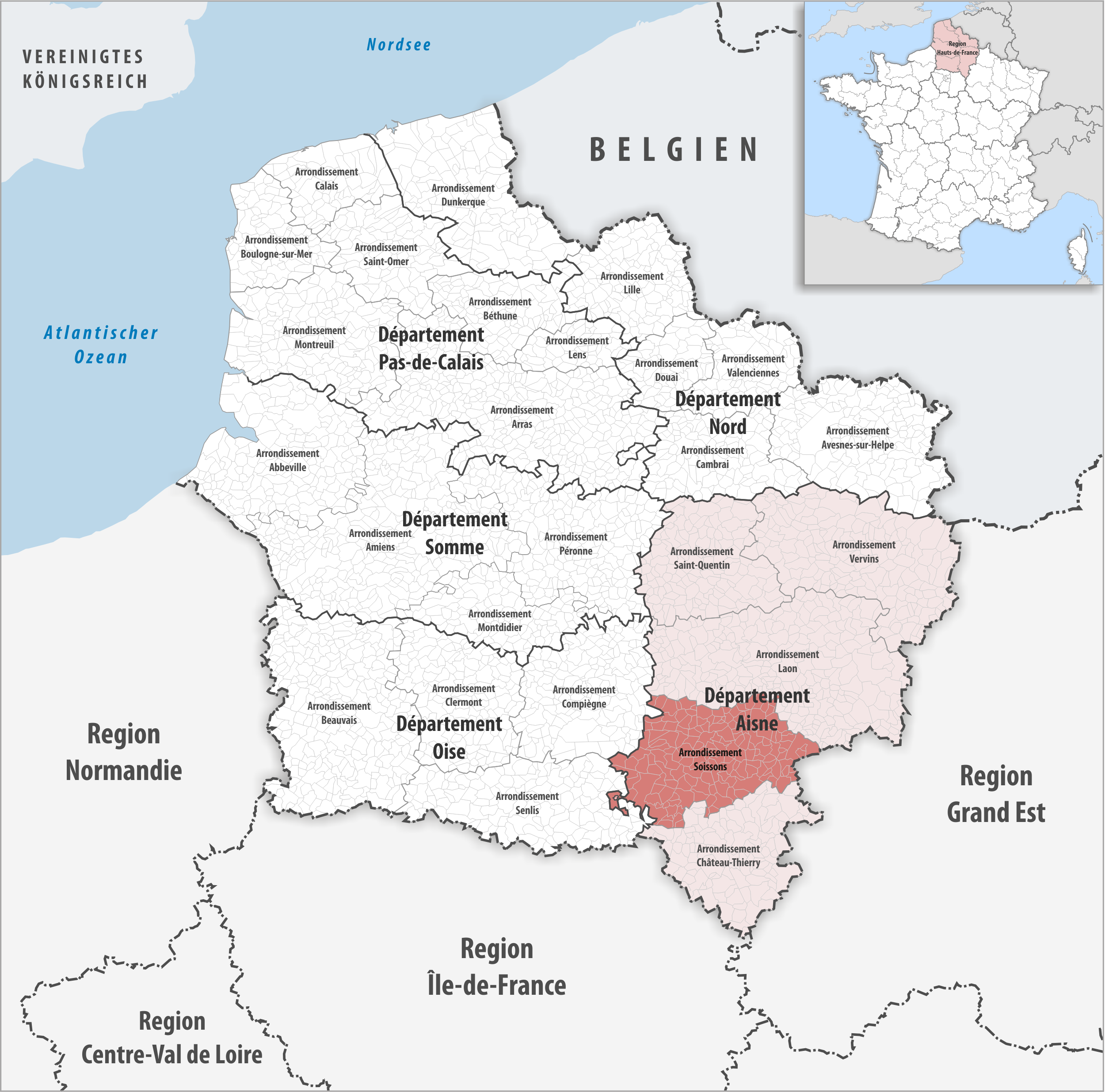 Lage des Arrondissements Soissons